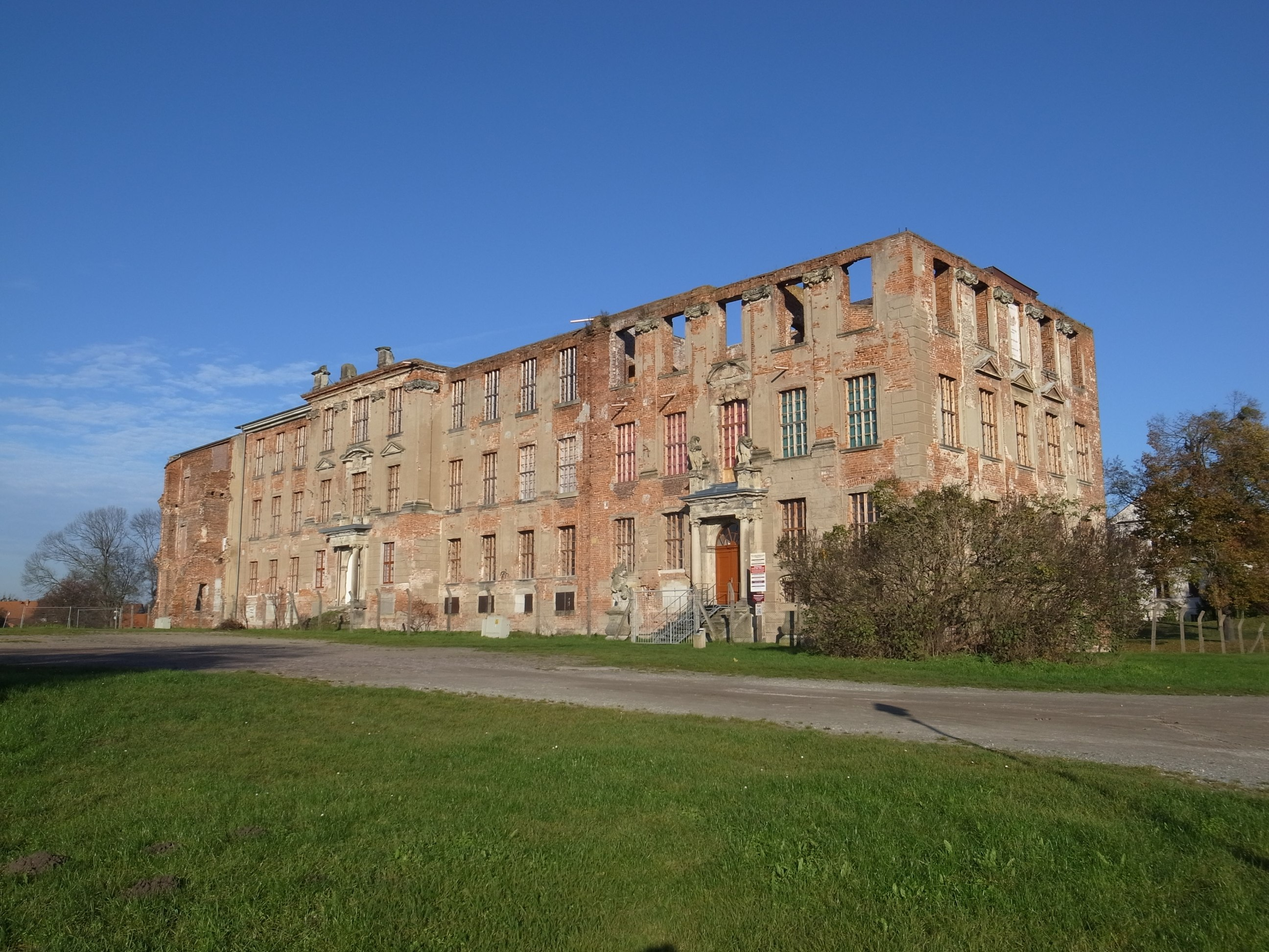 Zerbst/Anhalt, Schloss (Ostflügel). Seit 2005 erfolgen Sicherungsmaßnahmen und Sanierungsarbeiten durch den Förderverein Schloss Zerbst e. V. [1]